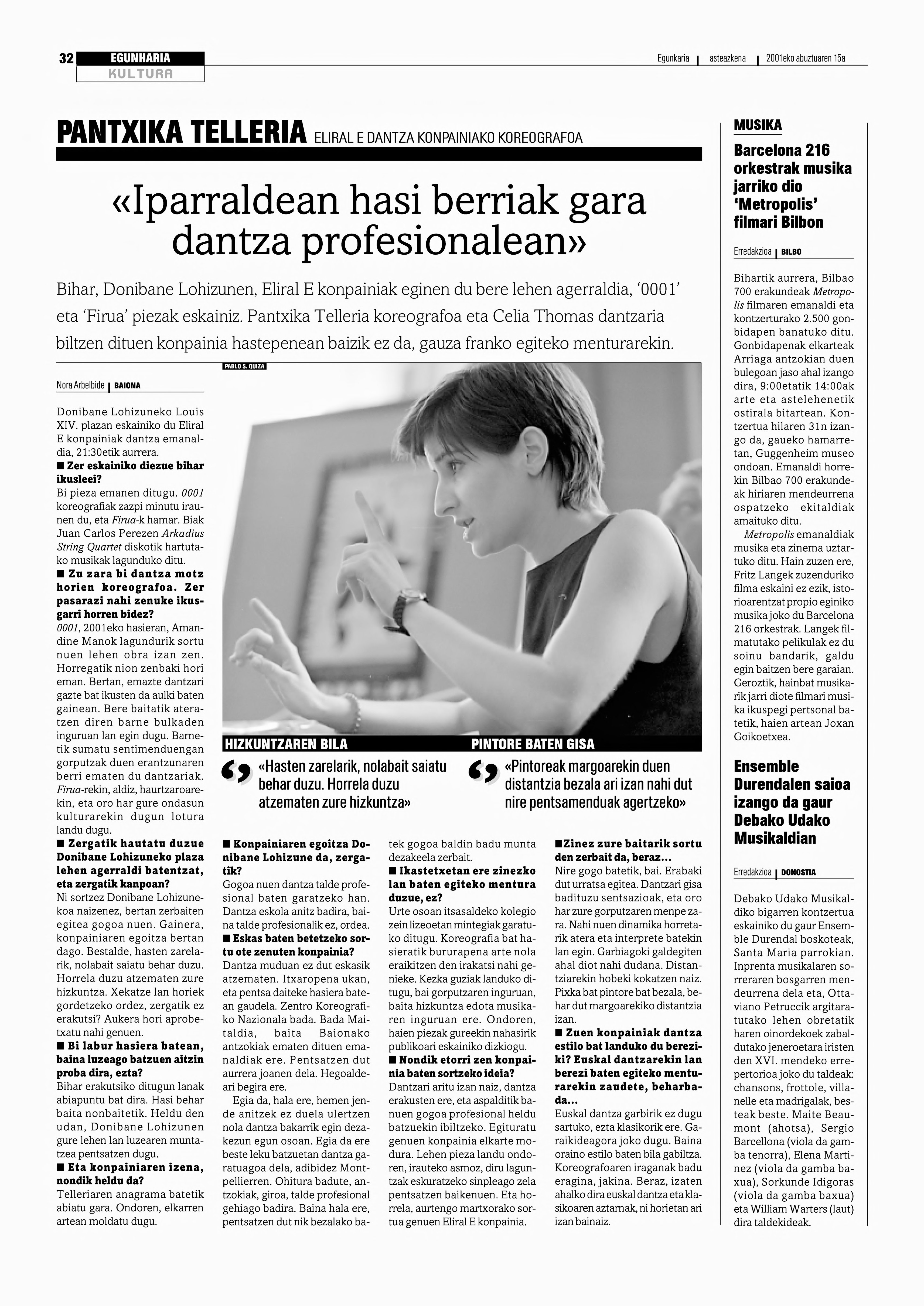 Pantxika Telleria koreografoa 2001ean Euskaldunon Egunkariaren hemerotekan